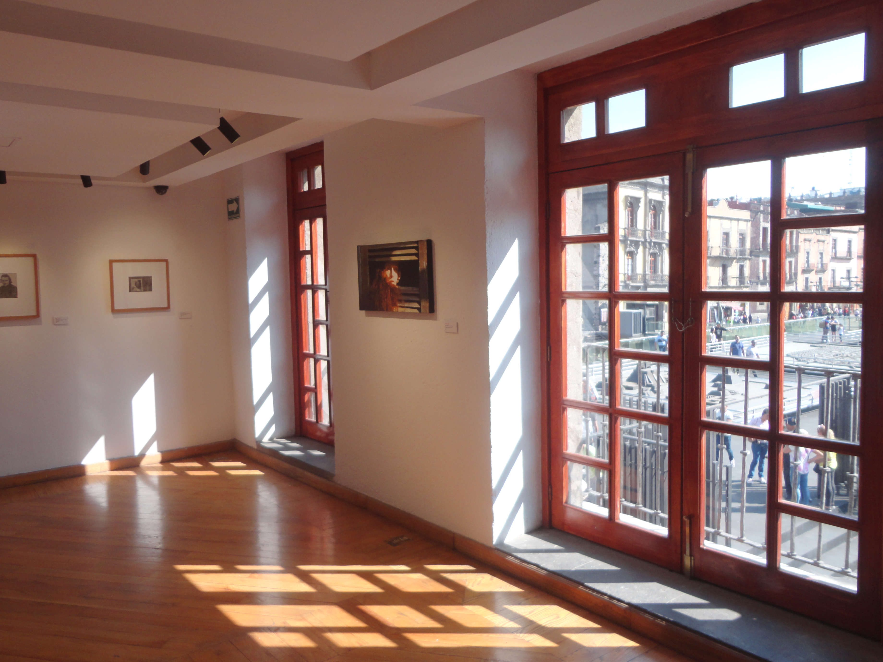 Interior del Museo Archivo de la Fotografía de la Ciudad de México.